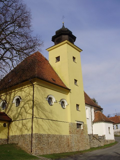 Římskokatolický kostel svatého Ondřeje v Roubanině